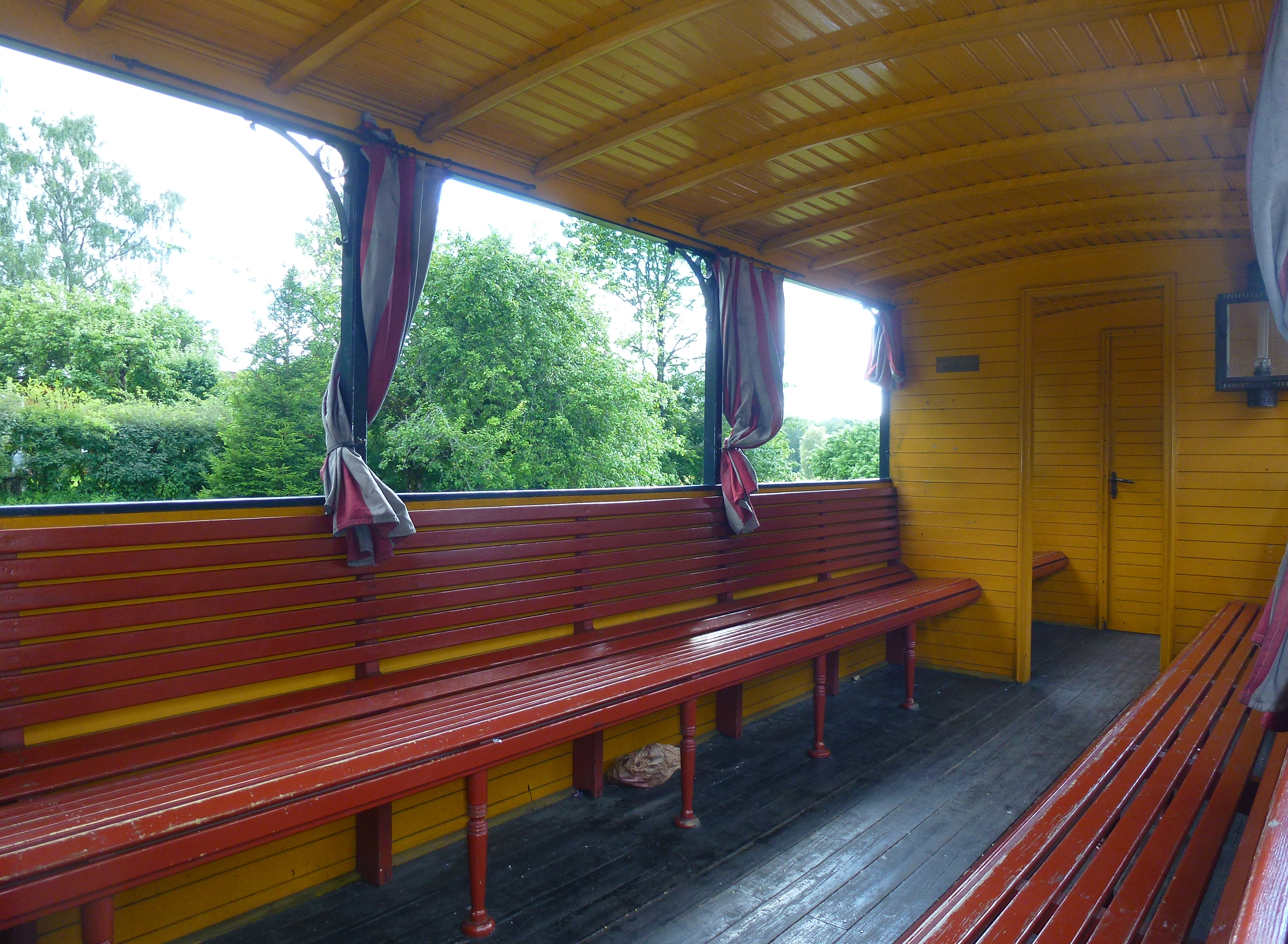 Lännakatten sommarvagn